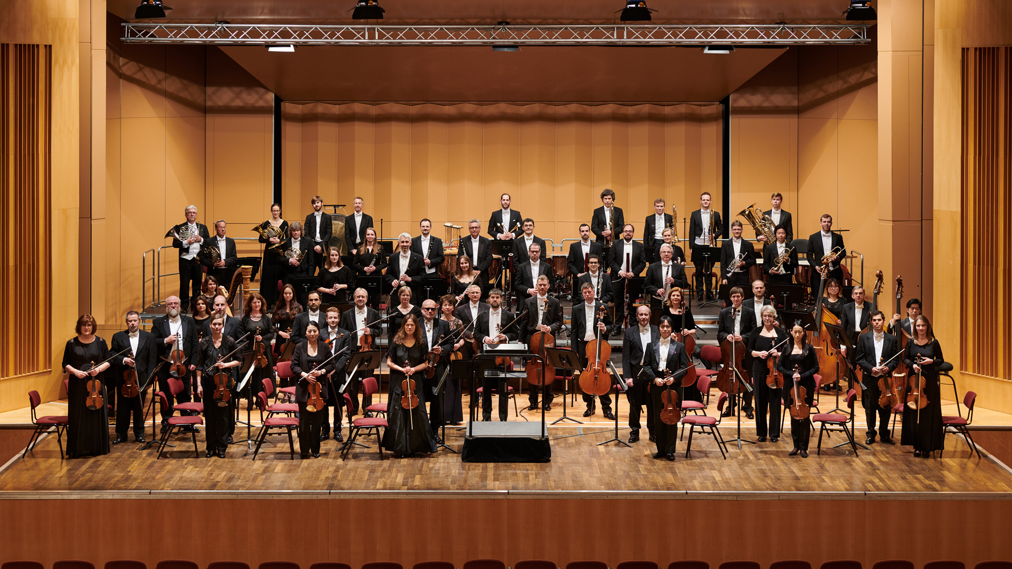 Das Göttinger Symphonie Orchester